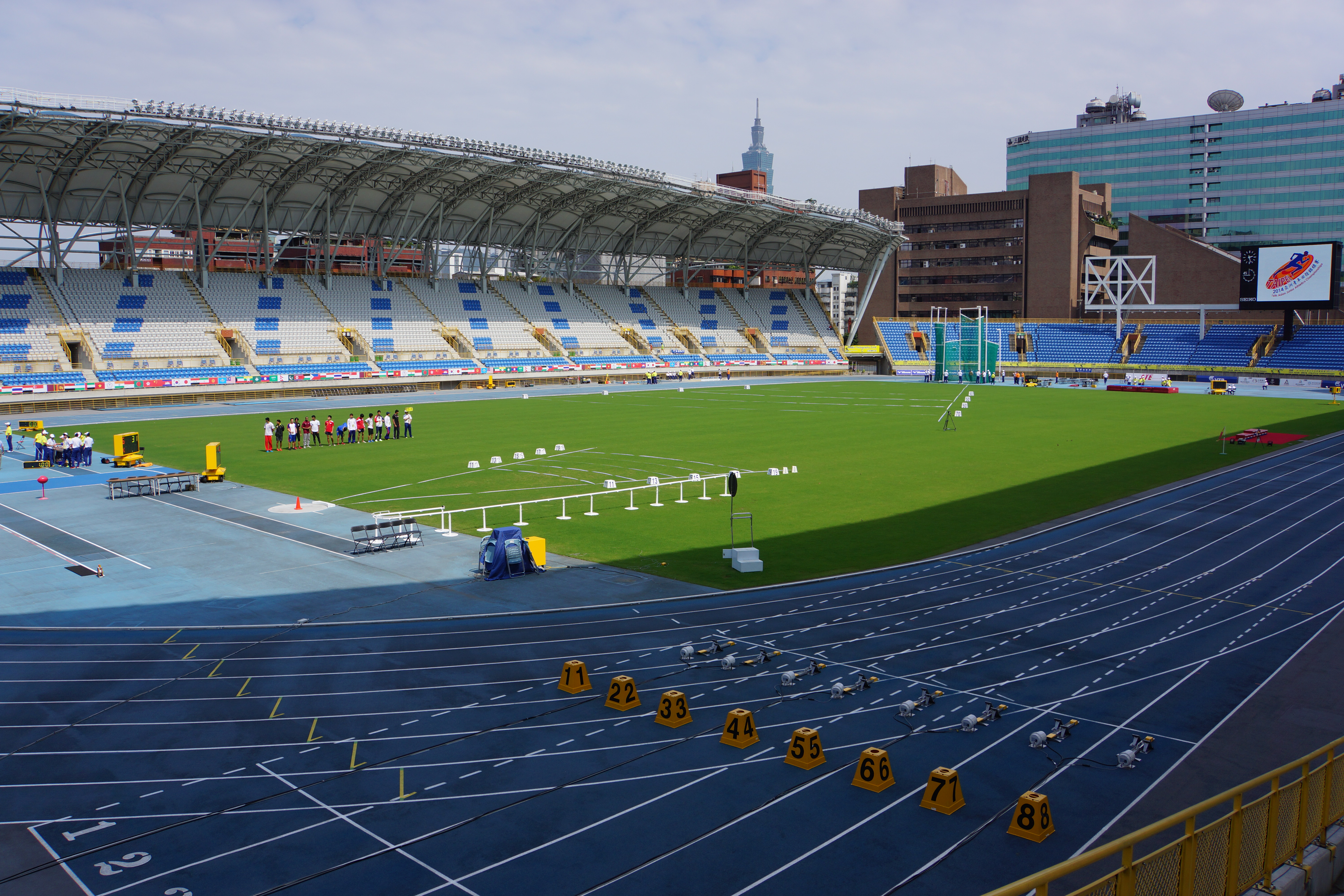 臺北田徑場、臺北市藝文推廣處藝文大樓、敦北長城大樓。